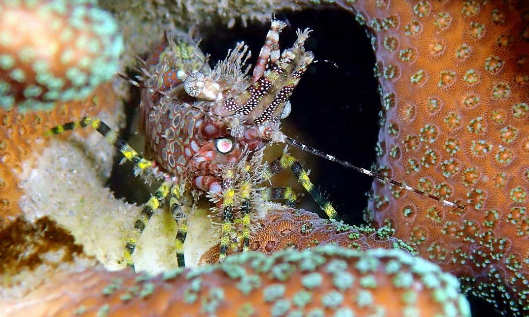 This Marbled Shrimp (Saron marmoratus) was found at the shallow water area of north shore of Long-Dong Bay, a famous diving site located at northeast coast of TAIWAN. The photo was taken by Vincent C. Chen on Oct. 3, 2015